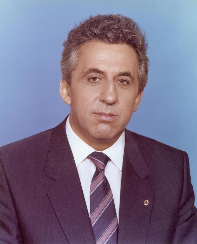 ADN-ZB/DEWAG/24.10.1989 Berlin: Egon Krenz, Generalsekretär des ZK der SED, Vorsitzender des Staatsrates der DDR, Vorsitzender des Nationalen Verteidigungsrates der DDR. Aufnahmedatum: 5.6.1984